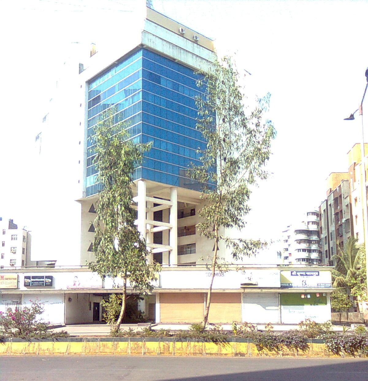 बेलापुर